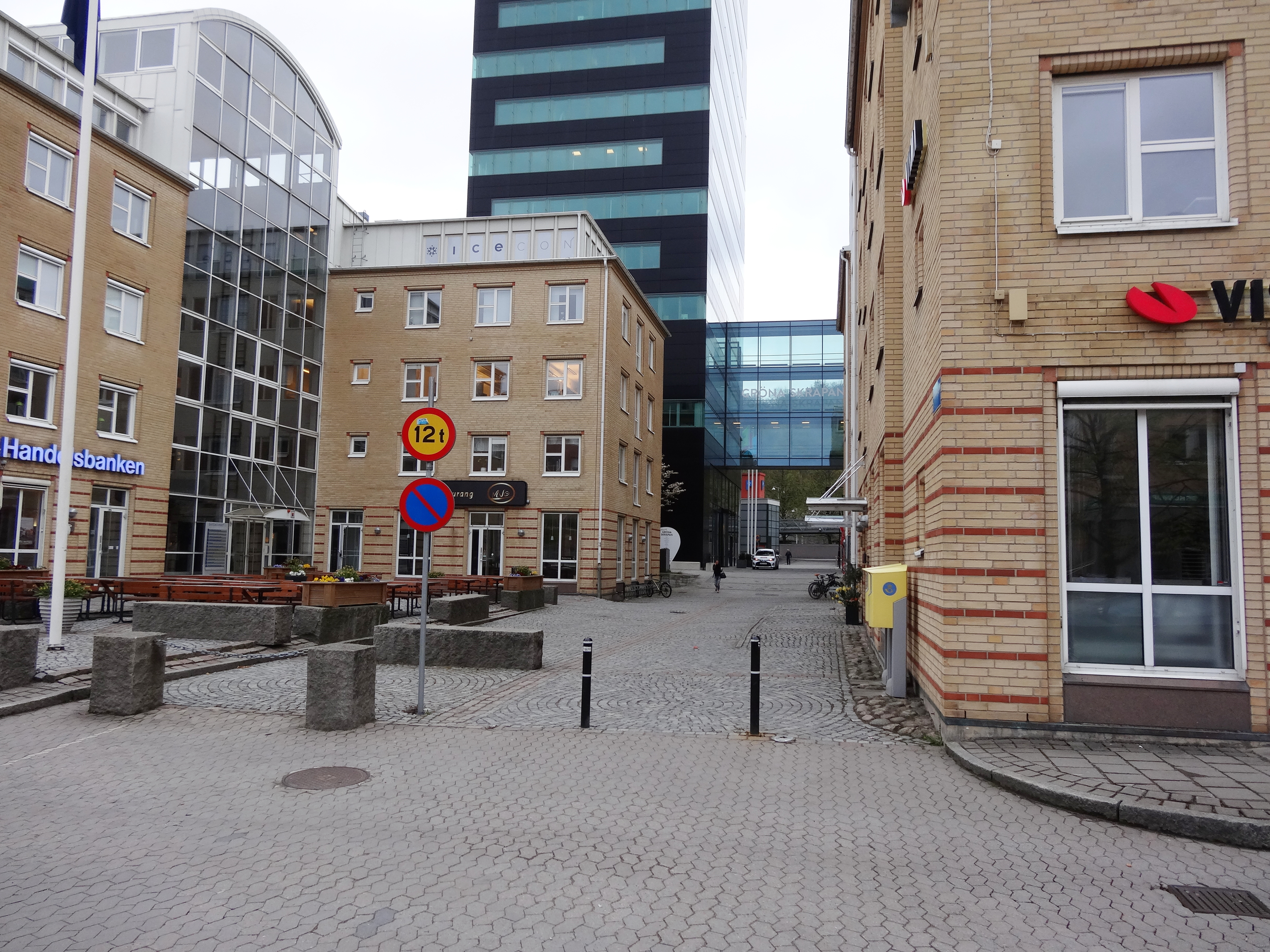 Gårdatorget i stadsdelen Gårda i Göteborg.